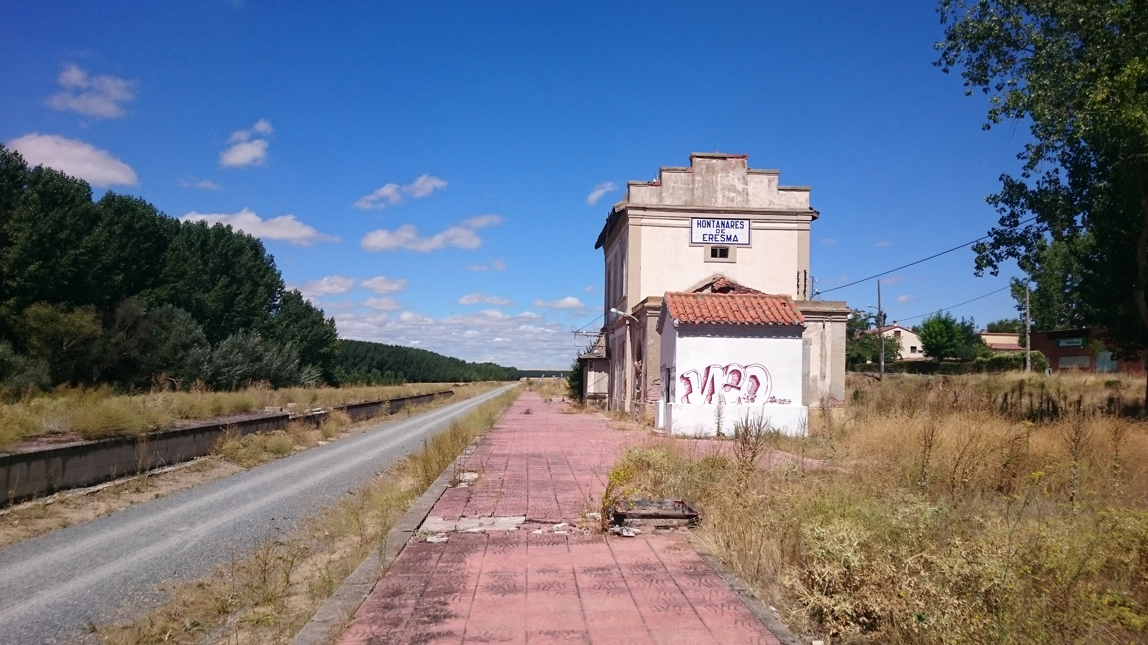 Antigua estación de la línea Villalba-Medina en Hontanares de Eresma